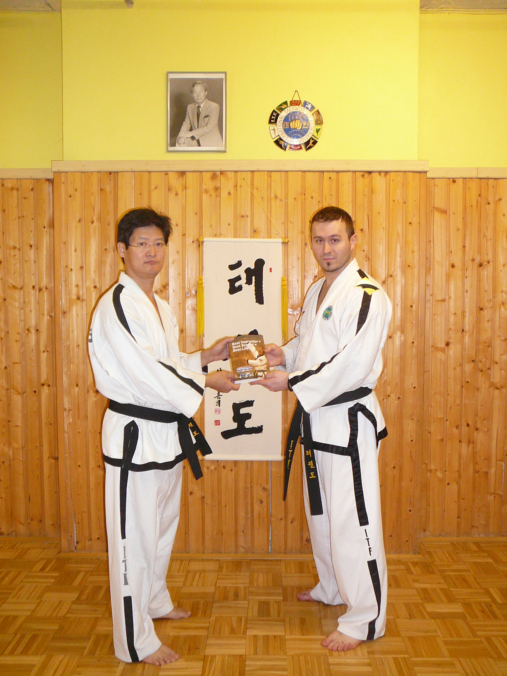 Auszeichnung vom ITF-HQ - Best Instructor and Best School in Austria 2008 (rechts Dalibor Medic)